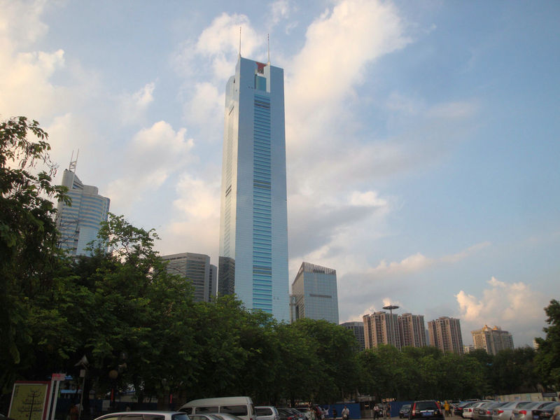 中信广场。